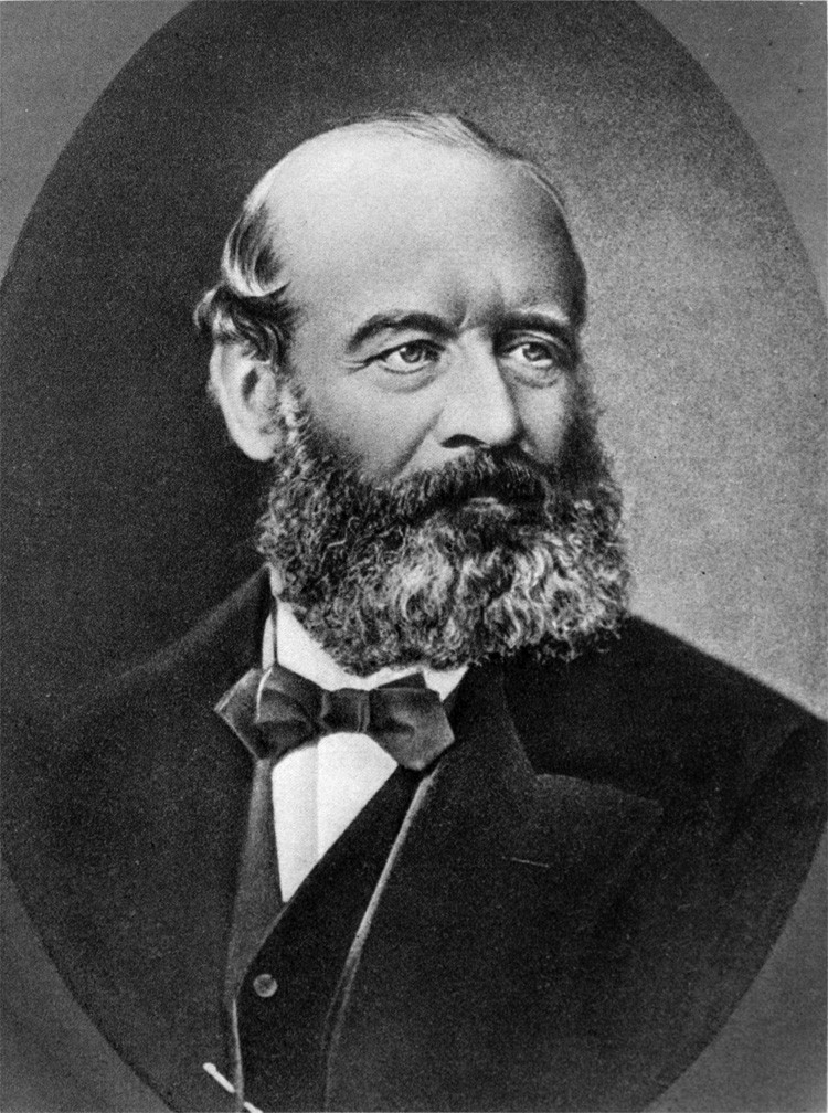 Alfred Escher (1819–1882). Führender liberaler Unternehmer und Politiker aus Zürich.